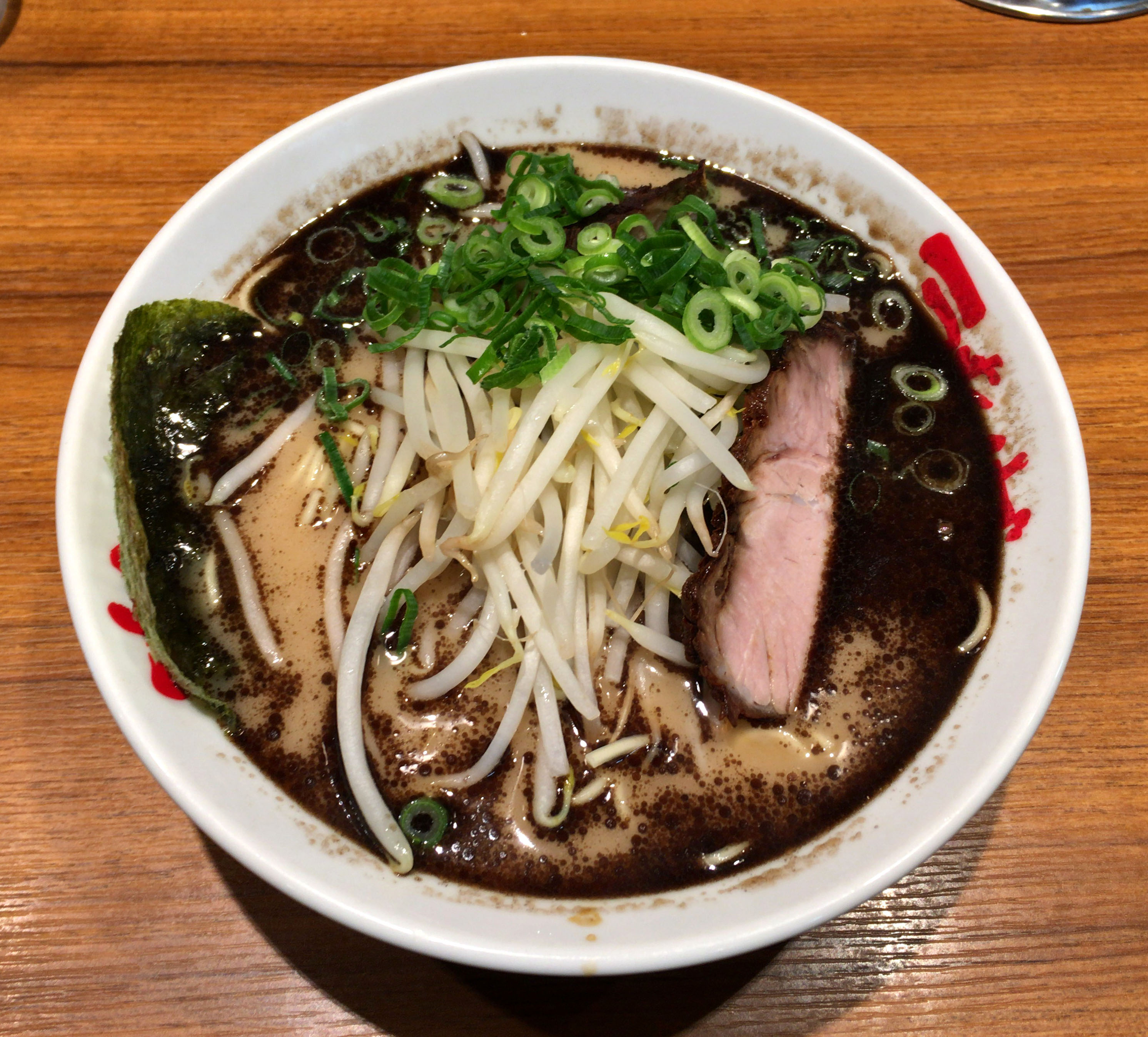 なんつッ亭の「らーめん」